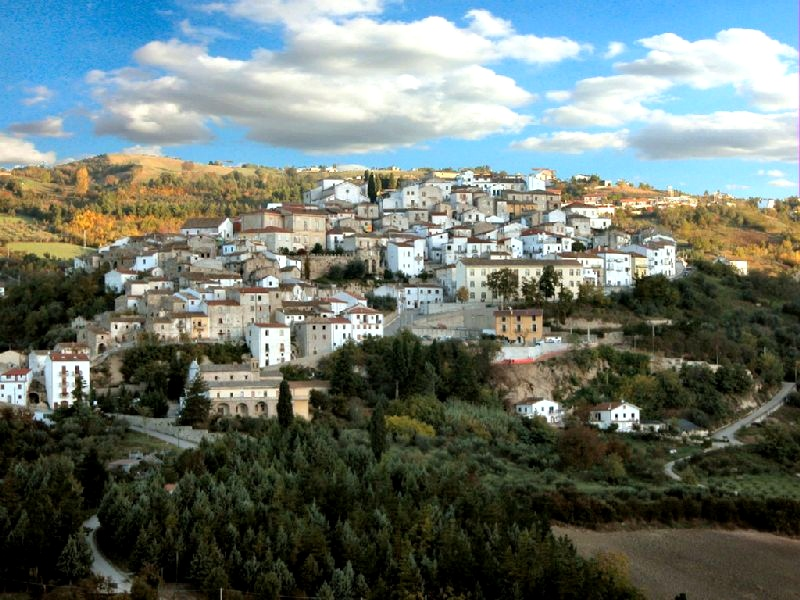 Panorama di Zungoli. Autore Gioacchino Grande